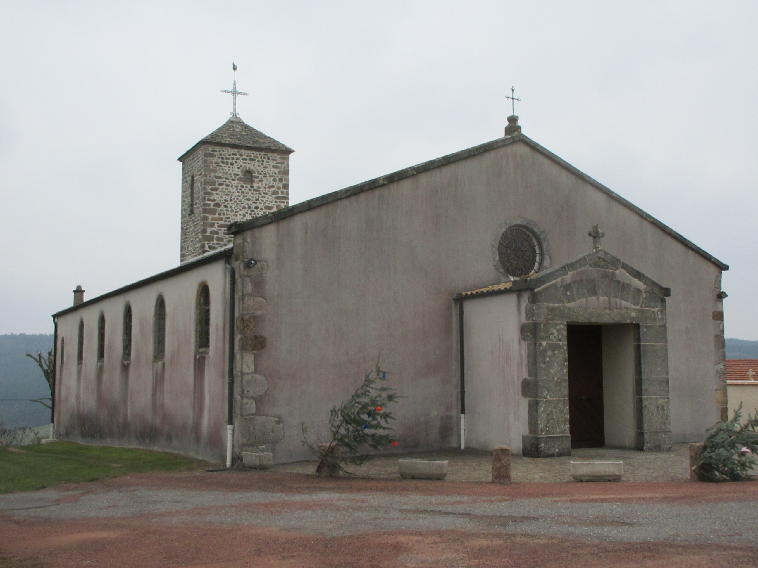 Église Saint-Christophe de Saint-Christophe, Rhône.